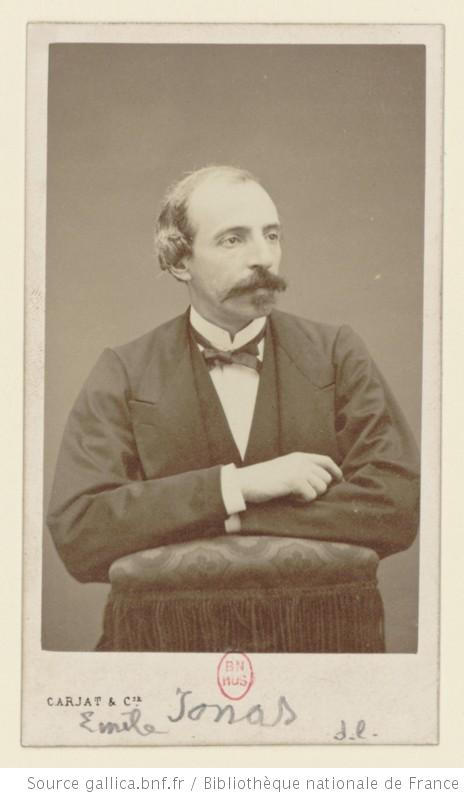 Photographie d'Emile Jonas par Etienne Carjat